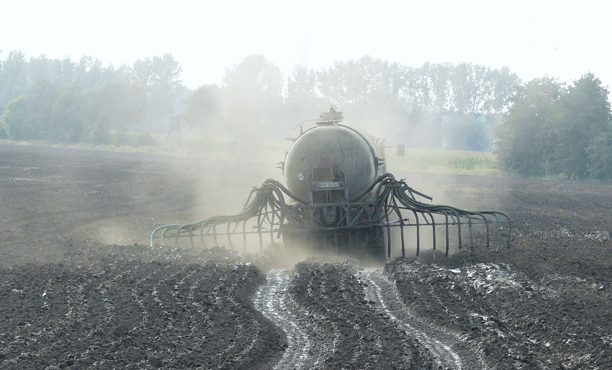 Rozlewanie gnojówki w Spreewaldzie.